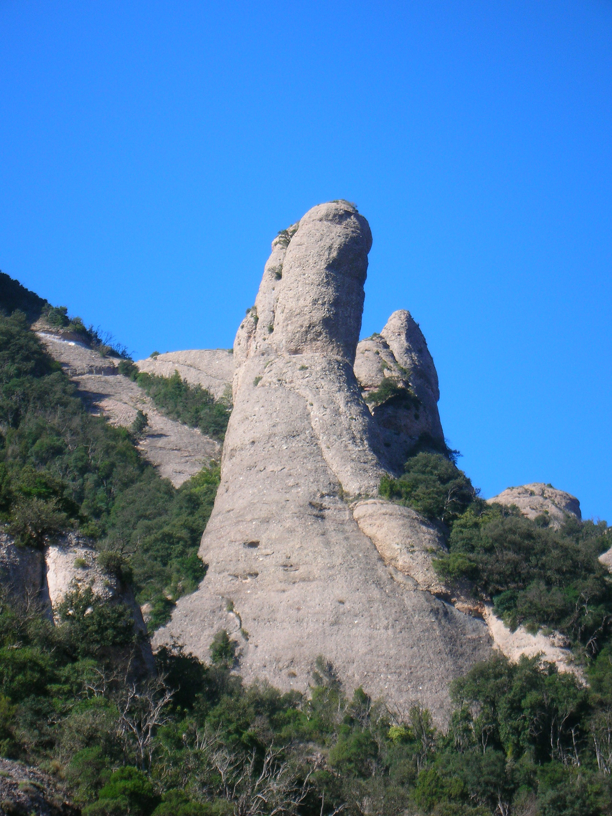 El Trencabarrals des del camí vell de Sant Jeroni, Montserrat, Catalunya.